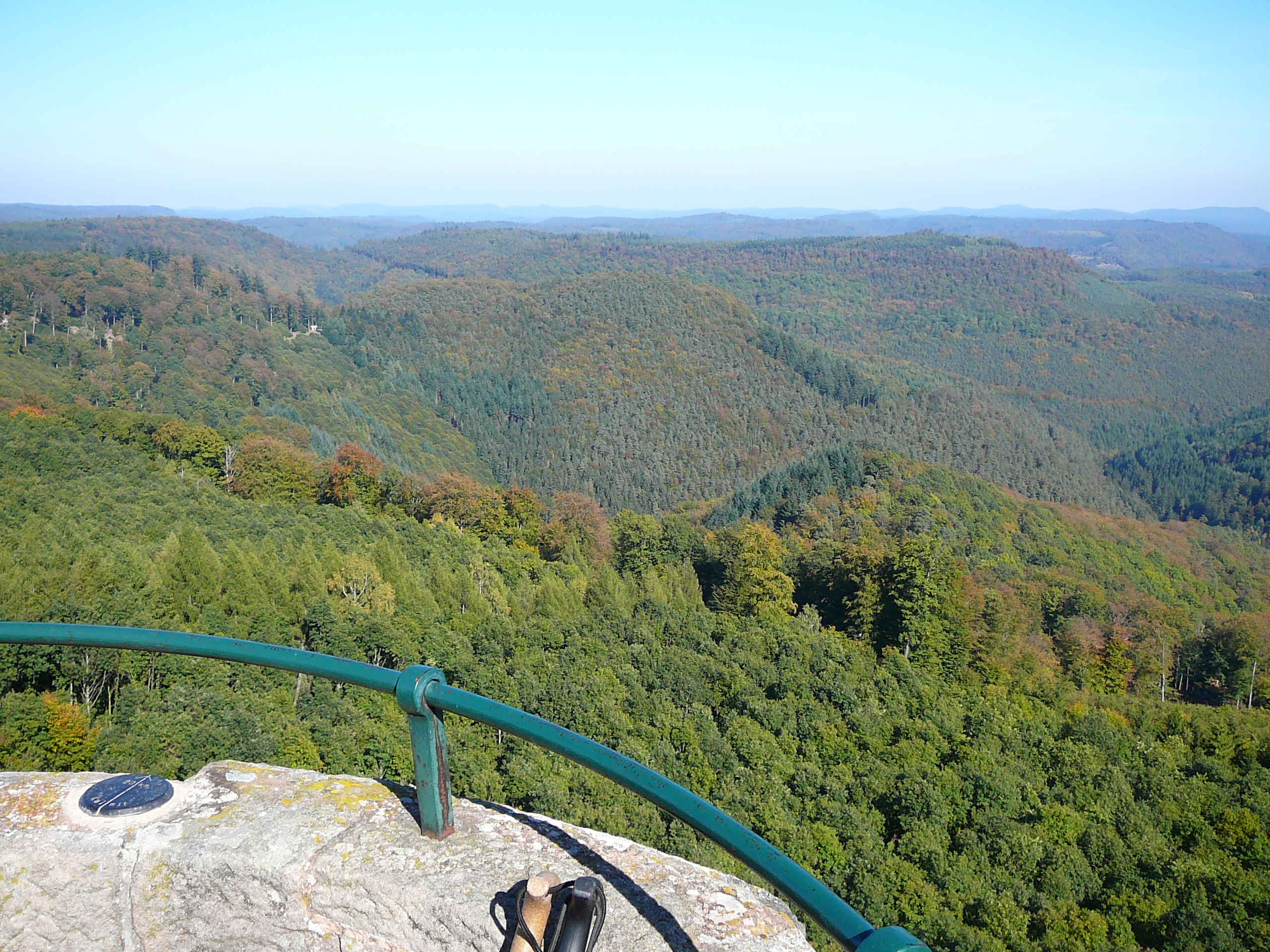 Blick vom Luitpoldturm über den Mittleren Pfälzerwald nach Nordosten: Im Vordergrund Kaltenbachtal und Eiderberg, im Hintergrund Drachenfels und Hoher Stoppelkopf (von links nach rechts)